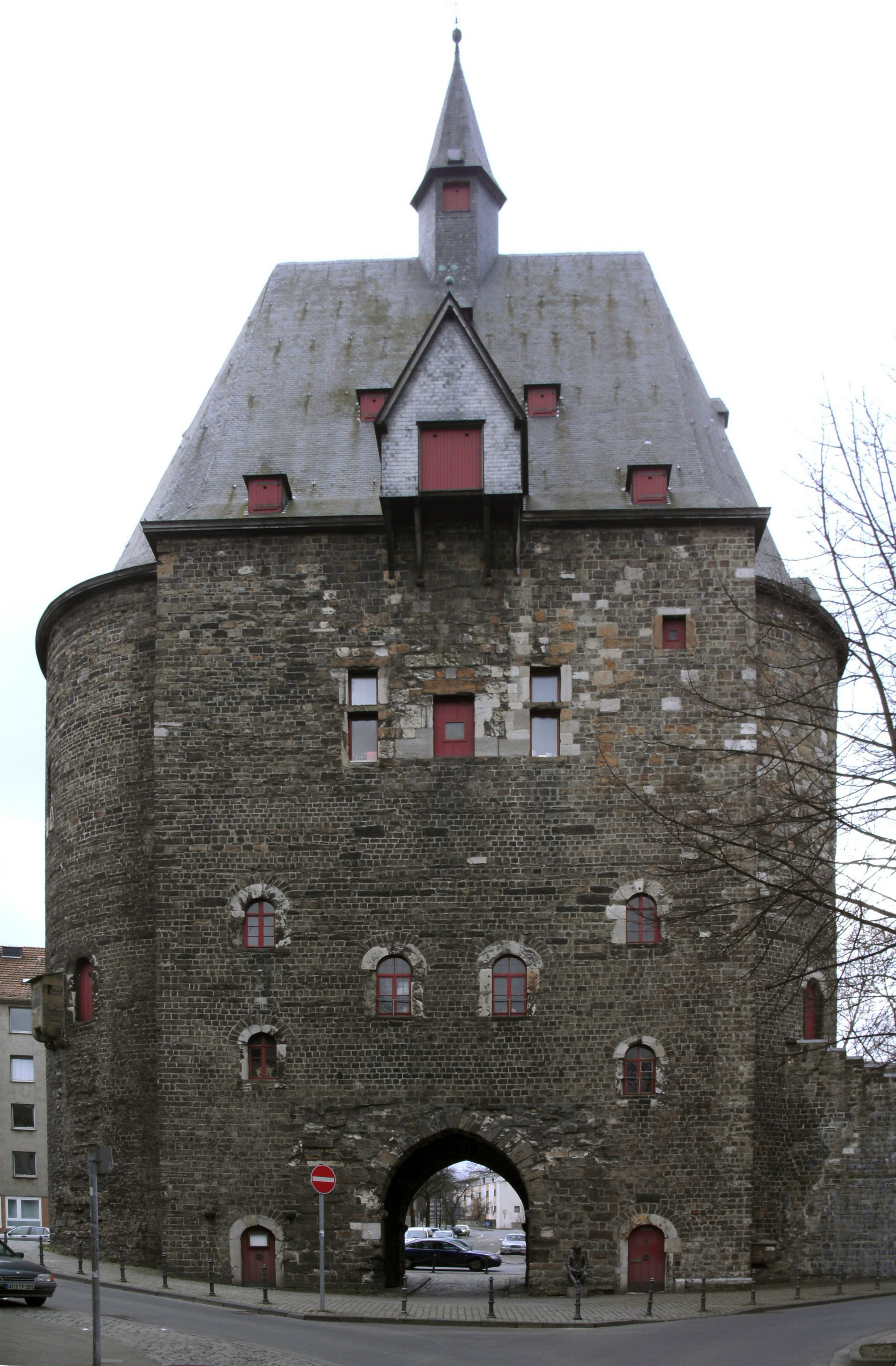 Das Marschiertor in Aachen